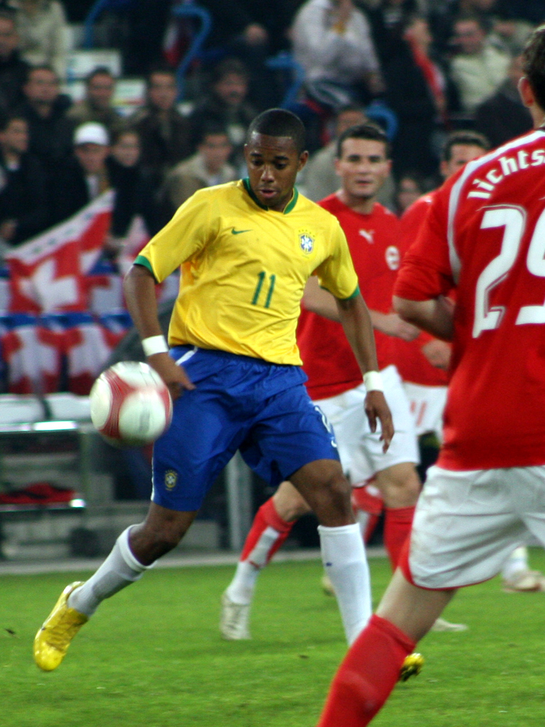 Robinho, St. Jakob Stadion, Basel (Switzerland), Switzerland - Brasil 1:2